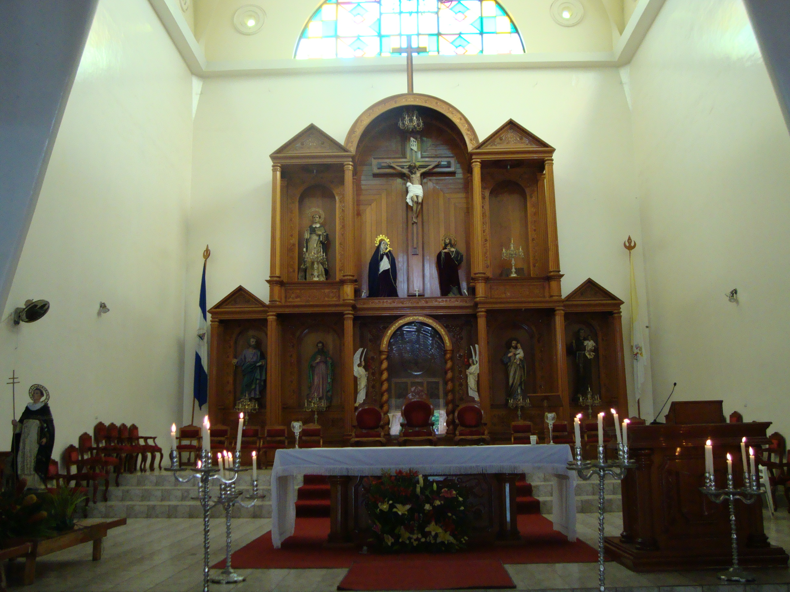 Altar mayor y presbiterio de la Catedral de Estelí